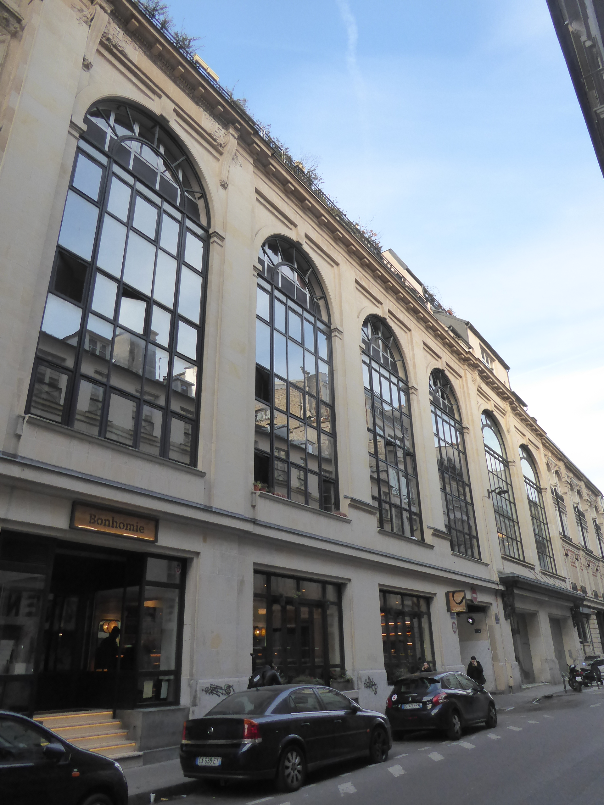 Rue d'Enghien 18 ancien siège du Petit parisen